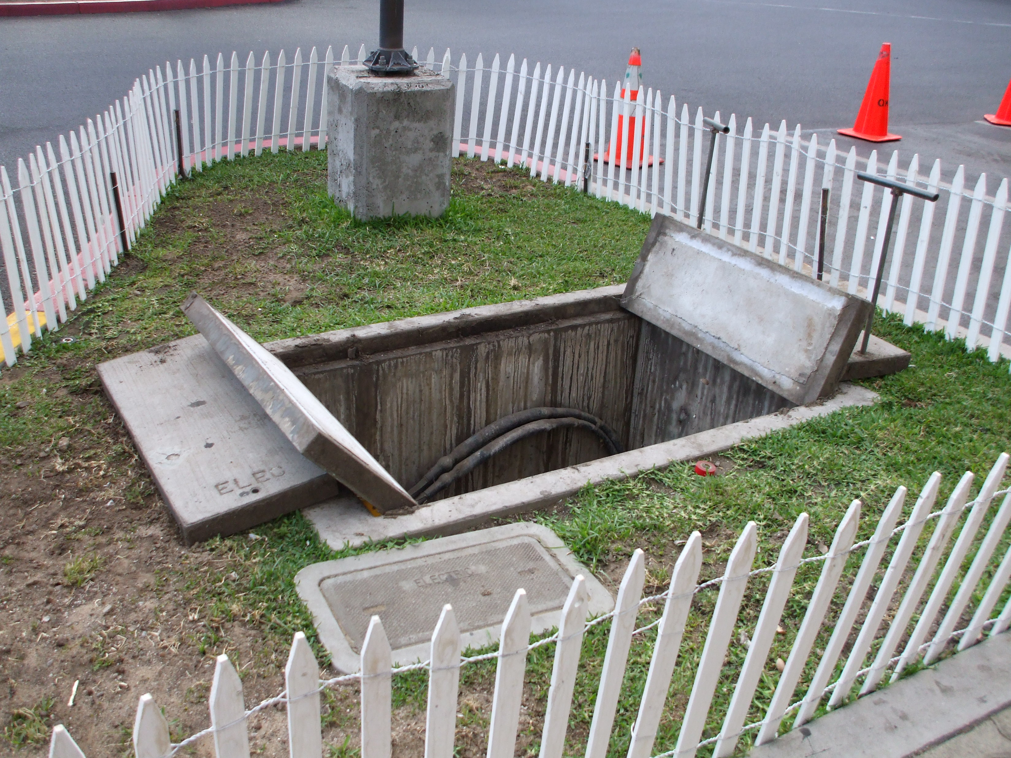 Open Utility Vault.